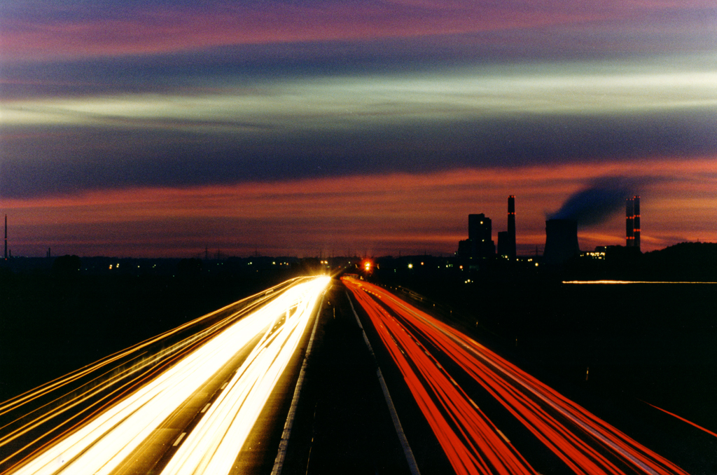 Bundesautobahn A4 bei Sonnenuntergang, Blickrichtung West. Im Hintergrund das Braunkohlenkraftwerk Weisweiler.